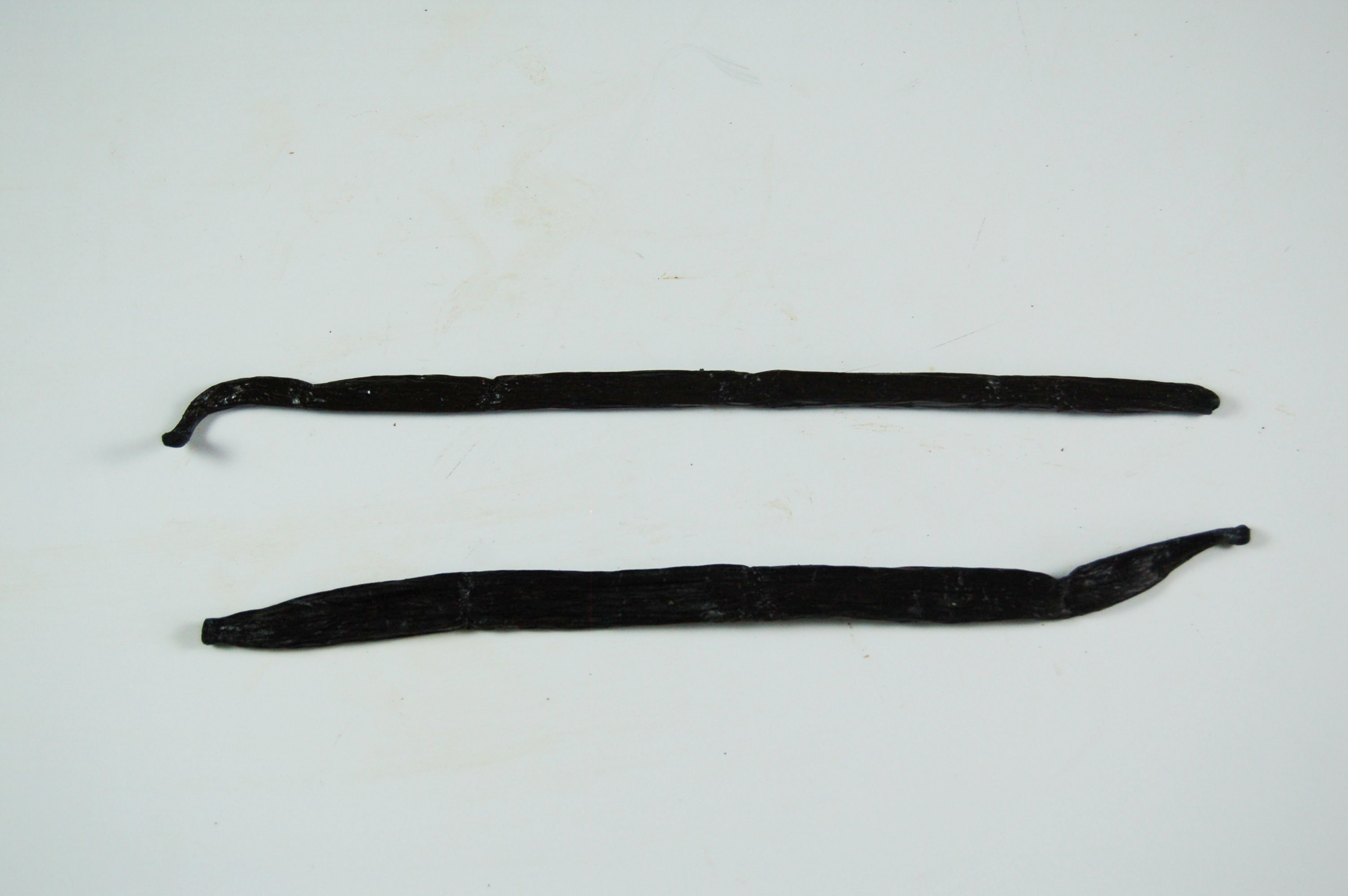 Vanille Bouron (en haut) et vanille Tahiti (en bas)